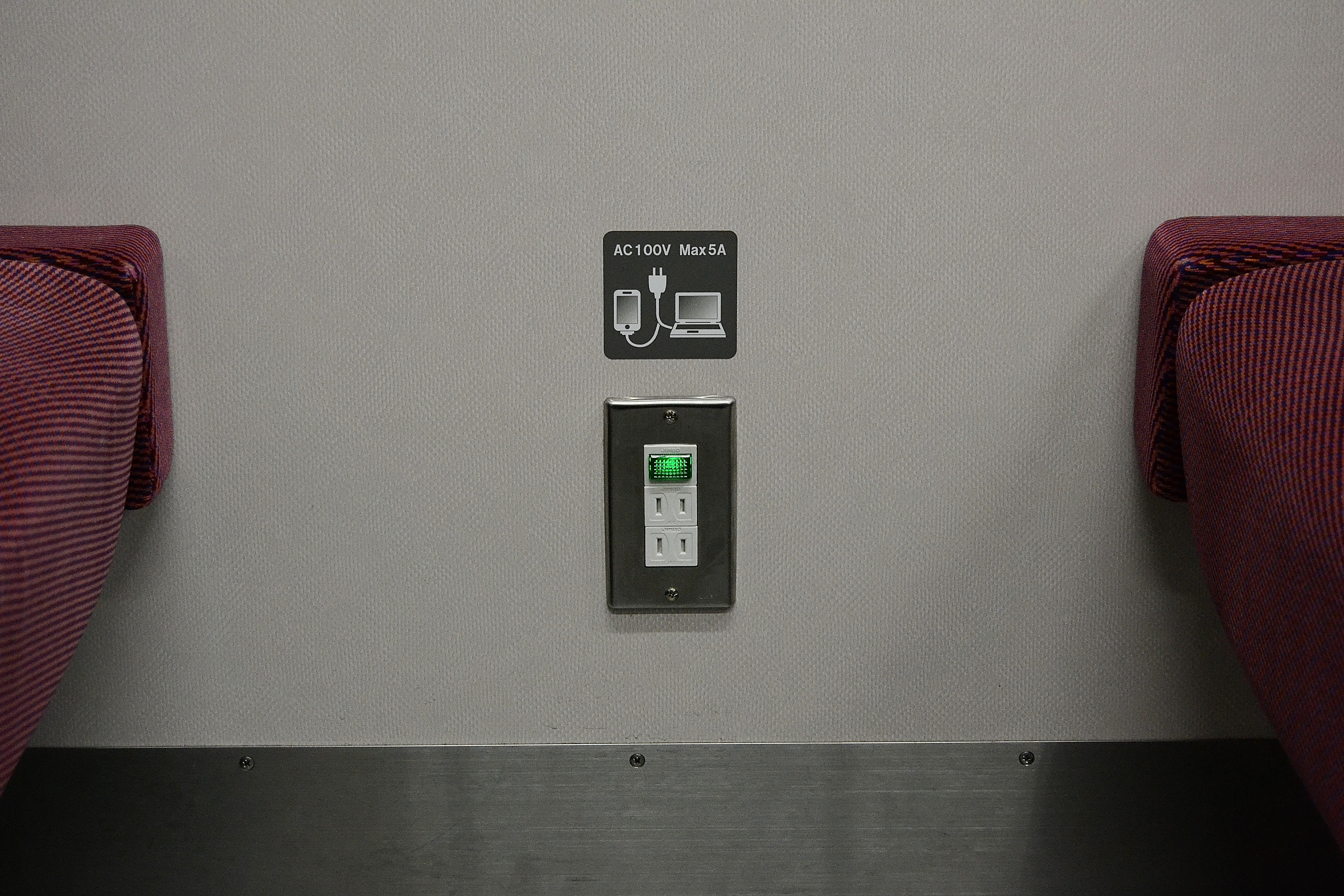 京急1000形（2代）の車内の車端にあるボックスシートに設置された2口コンセント。